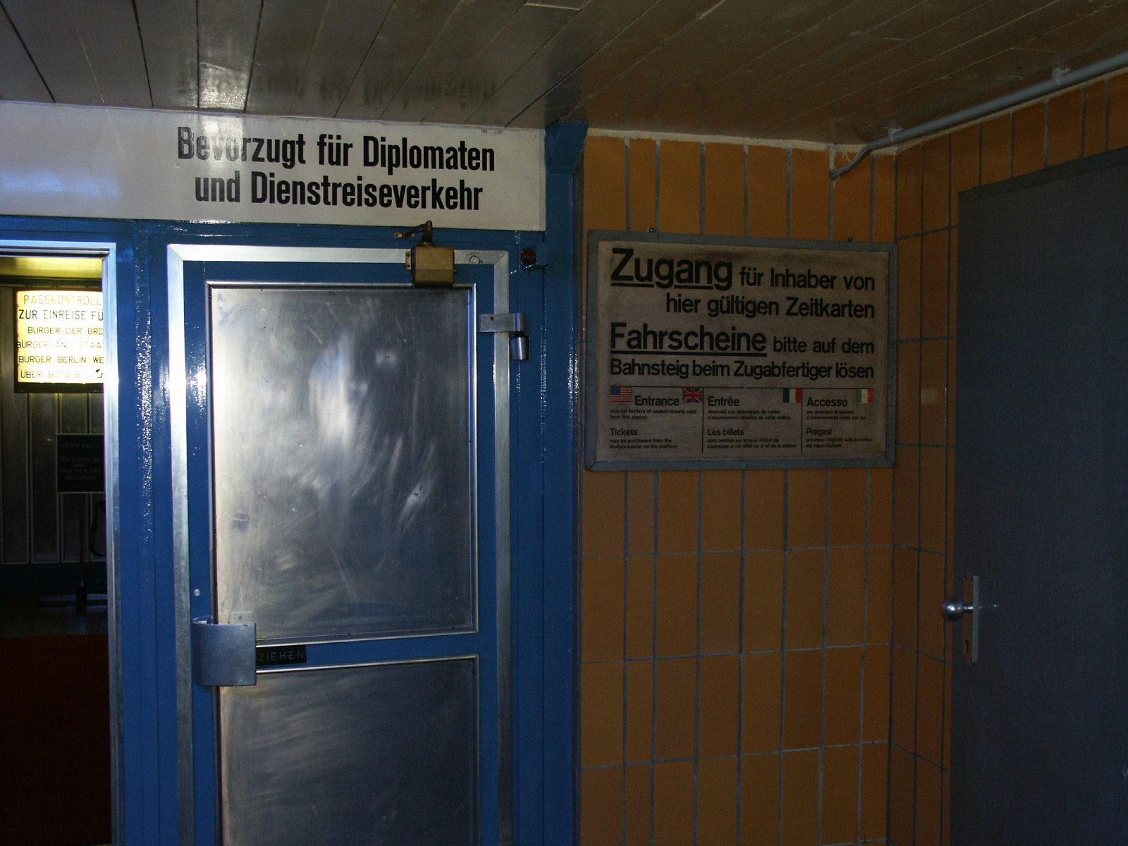 Abfertigung "Tränenpalast" Berlin (2004)